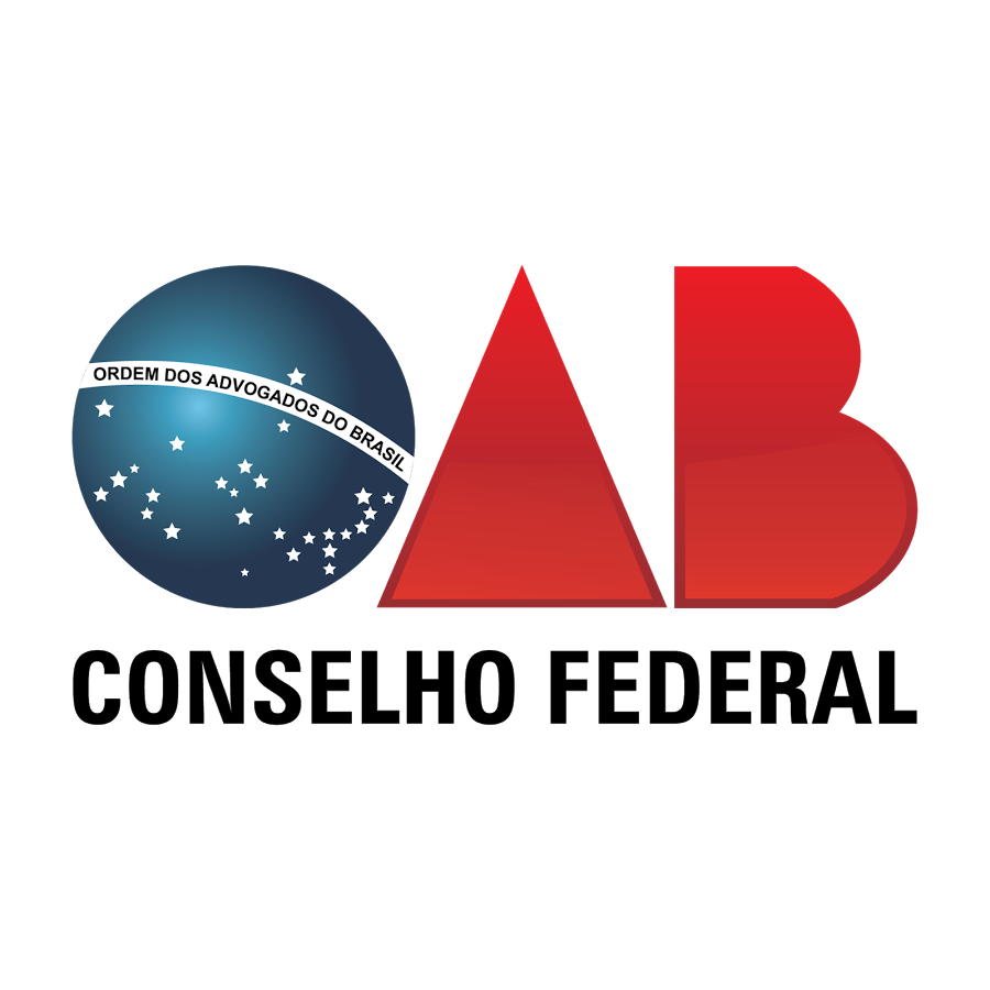 Logomarca conselho federal oab